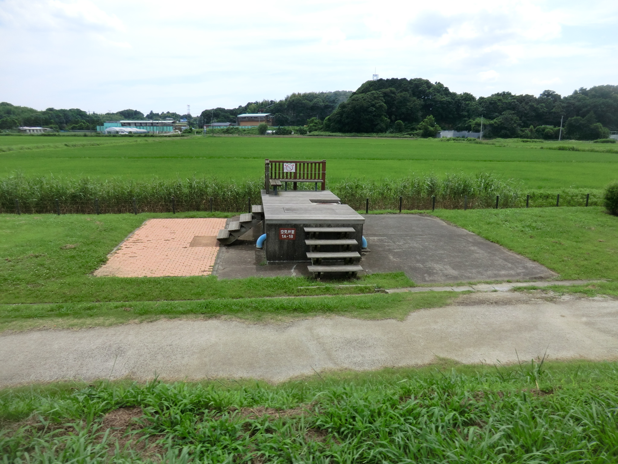 北千葉導水路はこのに2本の埋設管として通っている。手賀沼岸から手賀沼を背にして撮影。